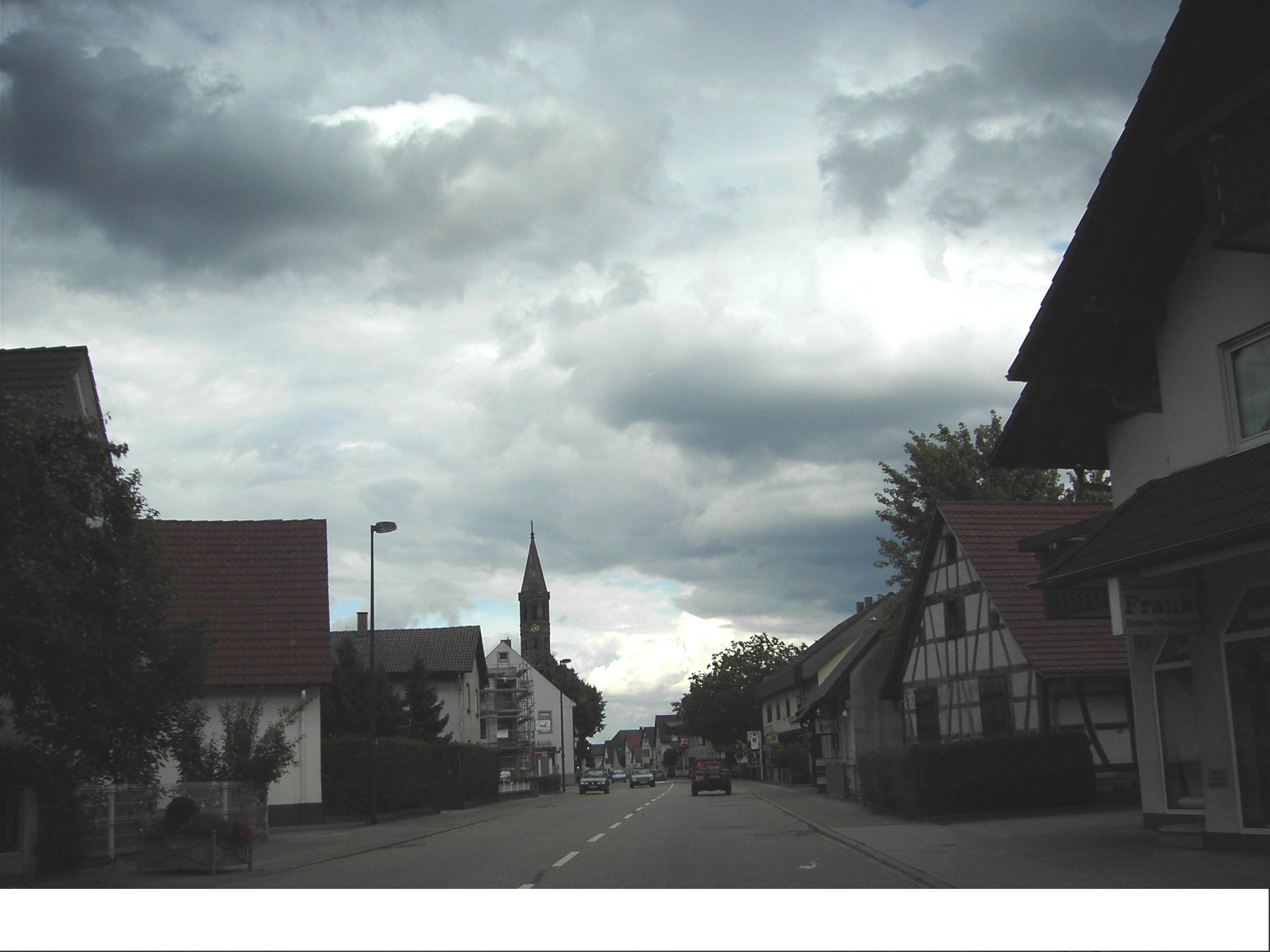 Hügelsheim-Hauptstraße (B36)